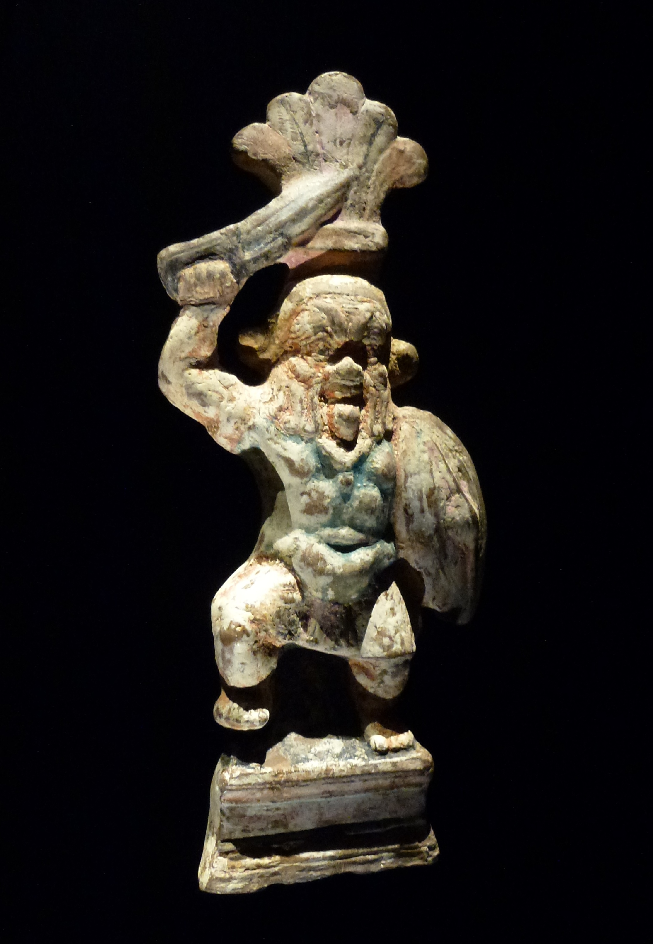 Statuette des Bes (Gottheit) , 2. Jahrhundert vor Christus[1]